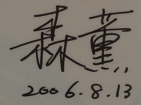 2006年（第7屆）漫畫博覽會的森薰簽名。